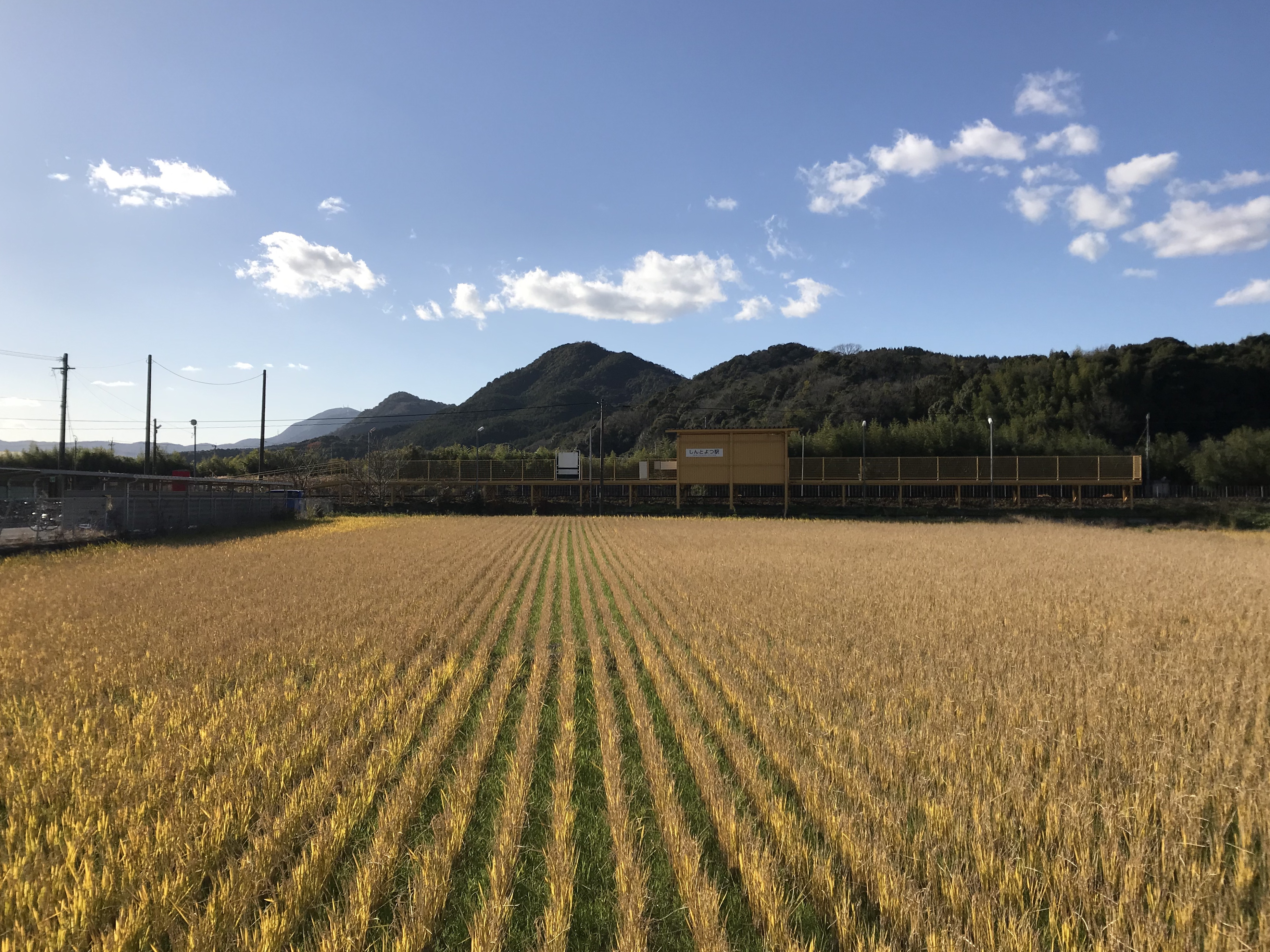 新豊津駅の遠景